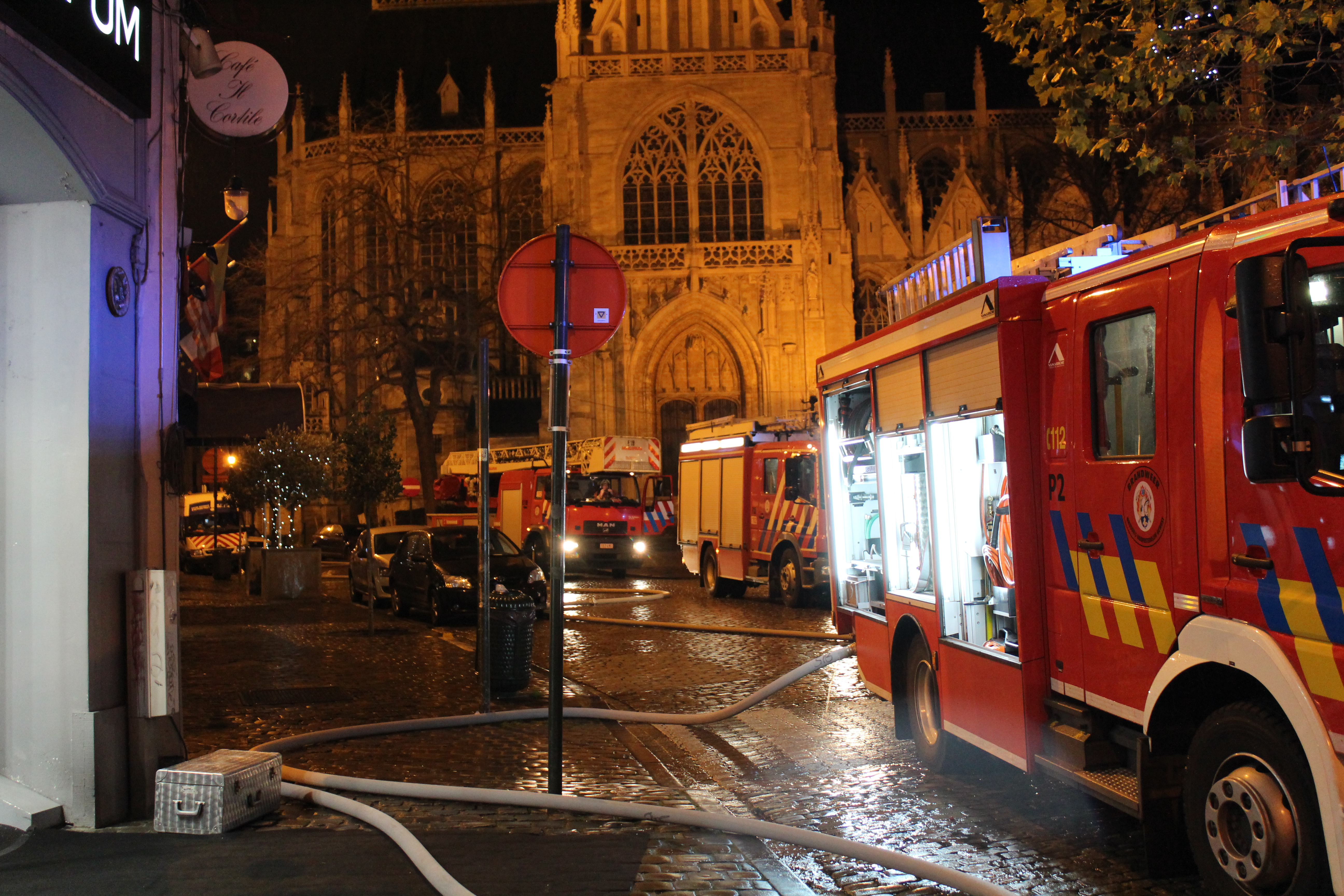 Camions de pompiers en intervention de nuit, place du Grand Sablon à Bruxelles.